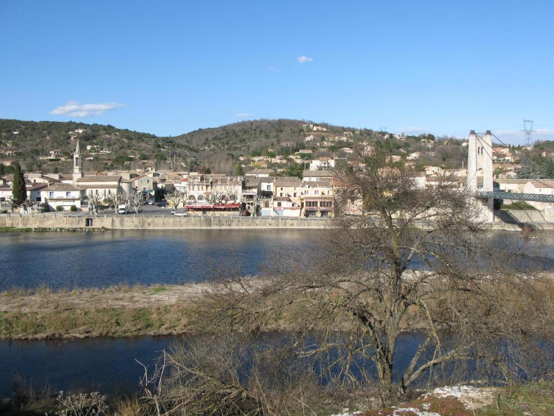 Village de Saint-Martin d'Ardèche (Ardèche)